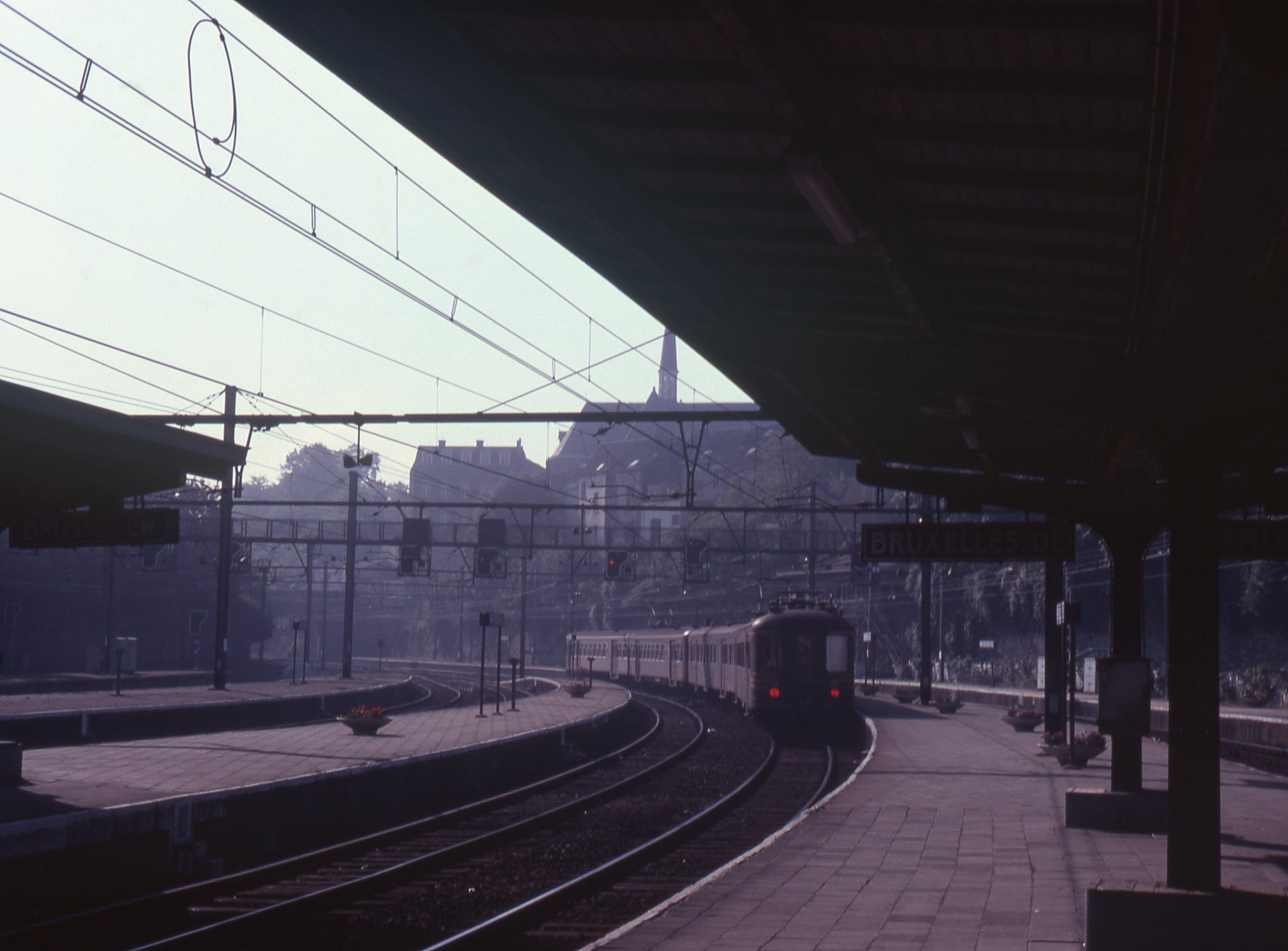 Een trein bestaande uit klassieke treinstellen verlaat het het toen genaamde Brussel Leopoldswijk station die nog niet overdekt was. De kerk op de achtergrond is de Kerk van het Heilig Sacrament.